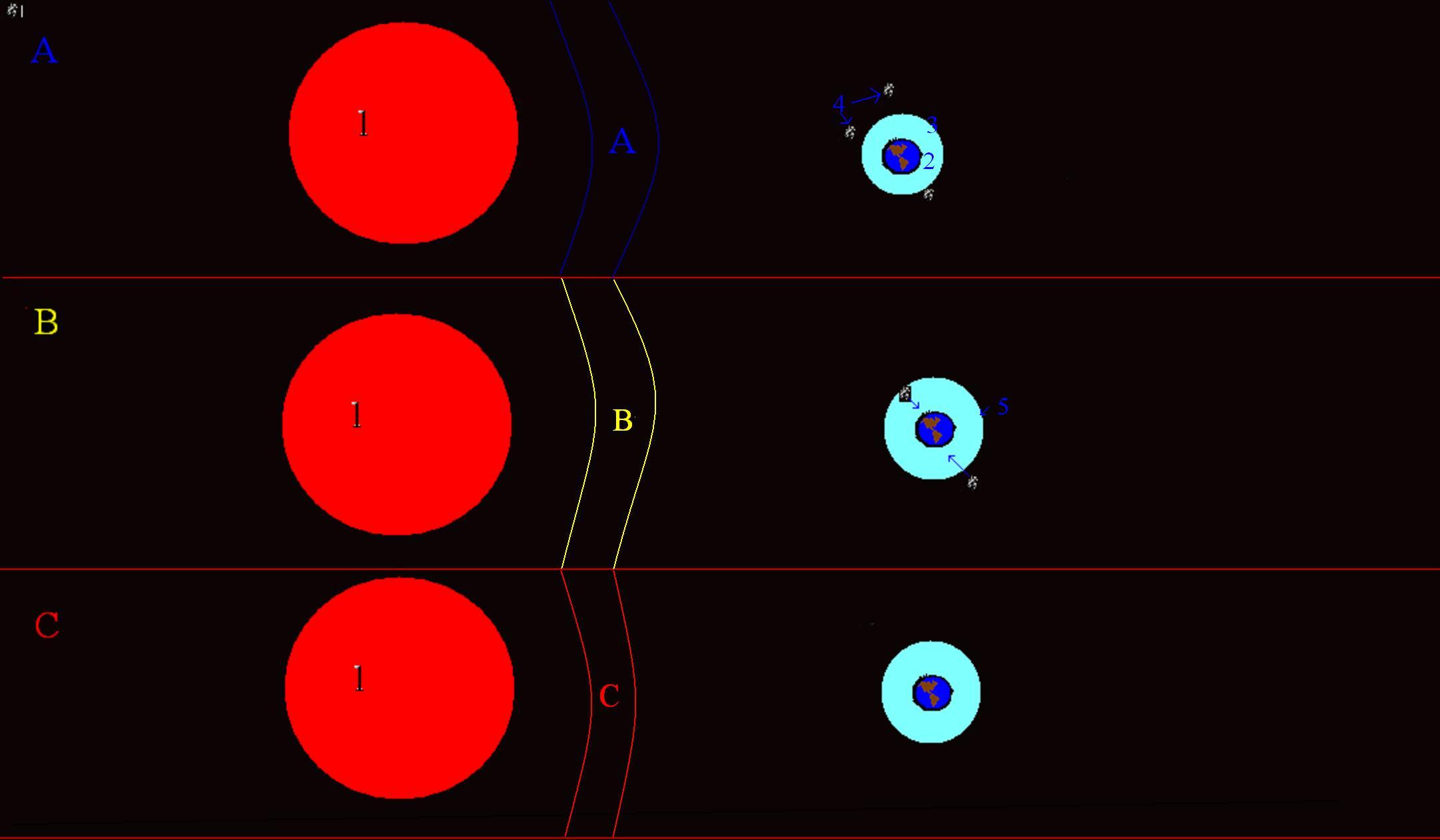 Fases de una tormenta solar, siendo: A) Erupción Solar, interrumpe las comunicaciones y agranda la atmósfera, haciendo que los satélites mas cercanos caigan a tierra. B) Tormenta de Radiación, afecta a personas fuera de la Tierra que no esten protegids contra el viento solar. C) CME(en inglés: Coronal Mass Ejection;en español: Eyección de Masa Coronal), plasma solar que puede quemar los transformadores con carga eléctrica y artefactos en el espacio con electricidad. El gran Telescopio Hubble terminaría frito si fuera impactado por una CME. El Sol es 1, la Tierra es 2, la atmósfera es 3, los satélites son 4 y la atmósfera despues de la erupción solar es 5 Esta imágen ha sido creada en Paint con el nombre de Solar_storm y formato JPG basada en datos sobre las etapas de una tormenta solar